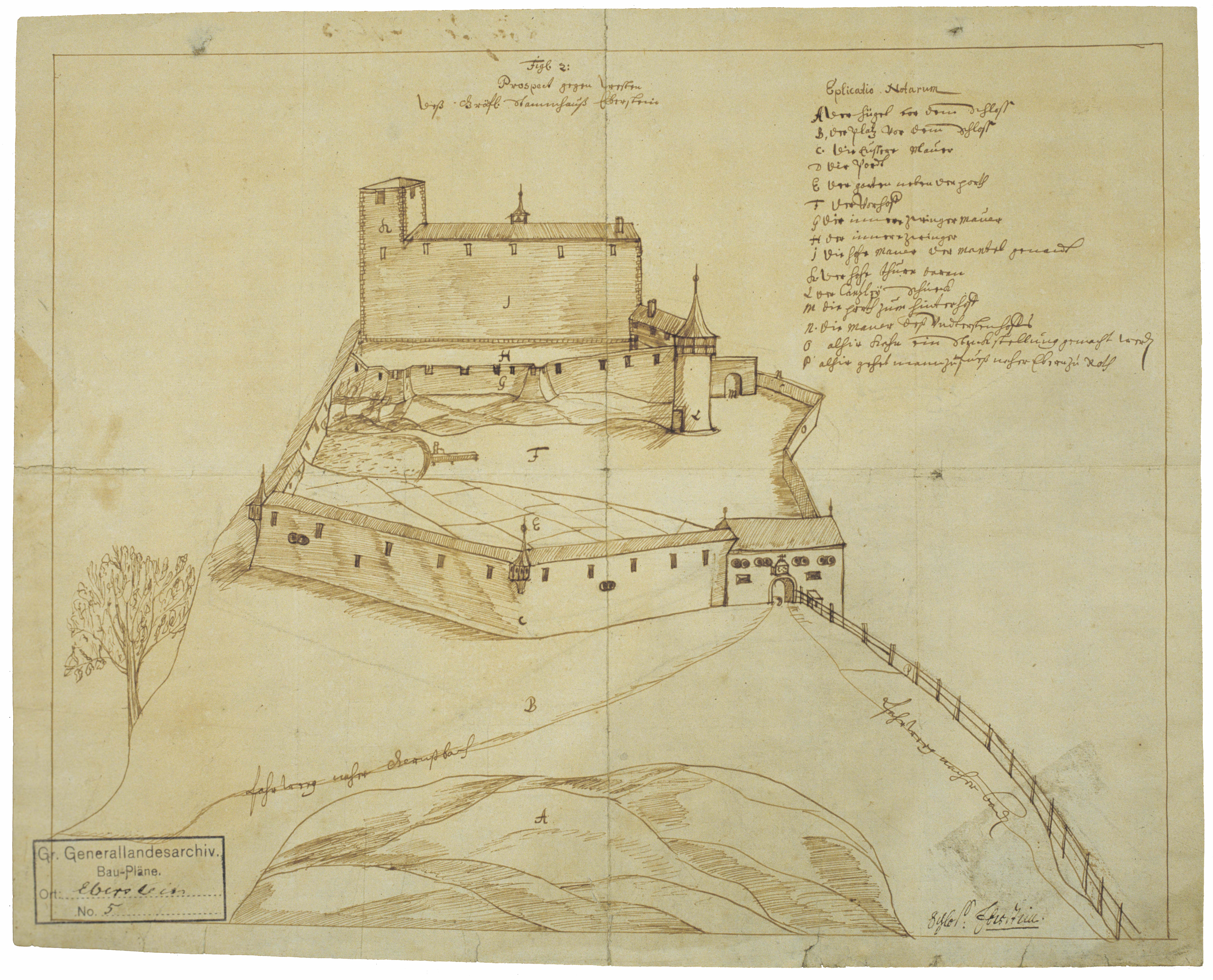 Schloss Neueberstein, Ende 17. Jahrhundert (GLAK G Eberstein 5)